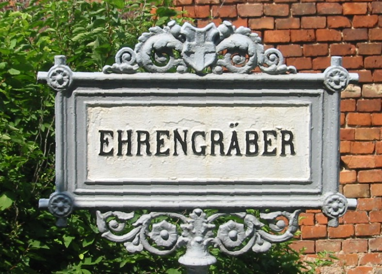 Wiener Zentralfriedhof, Ehrengräber Schild